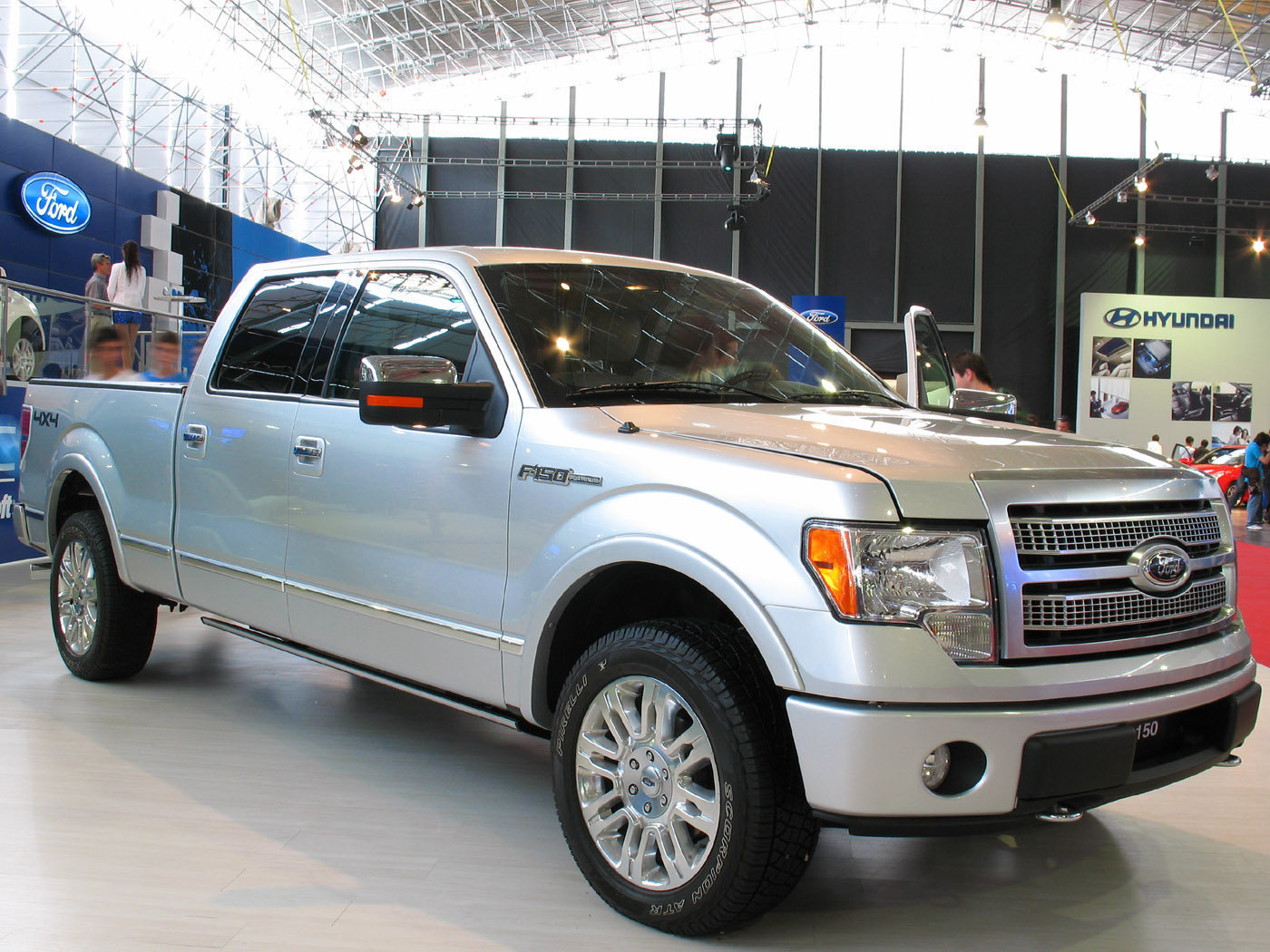 ford f150